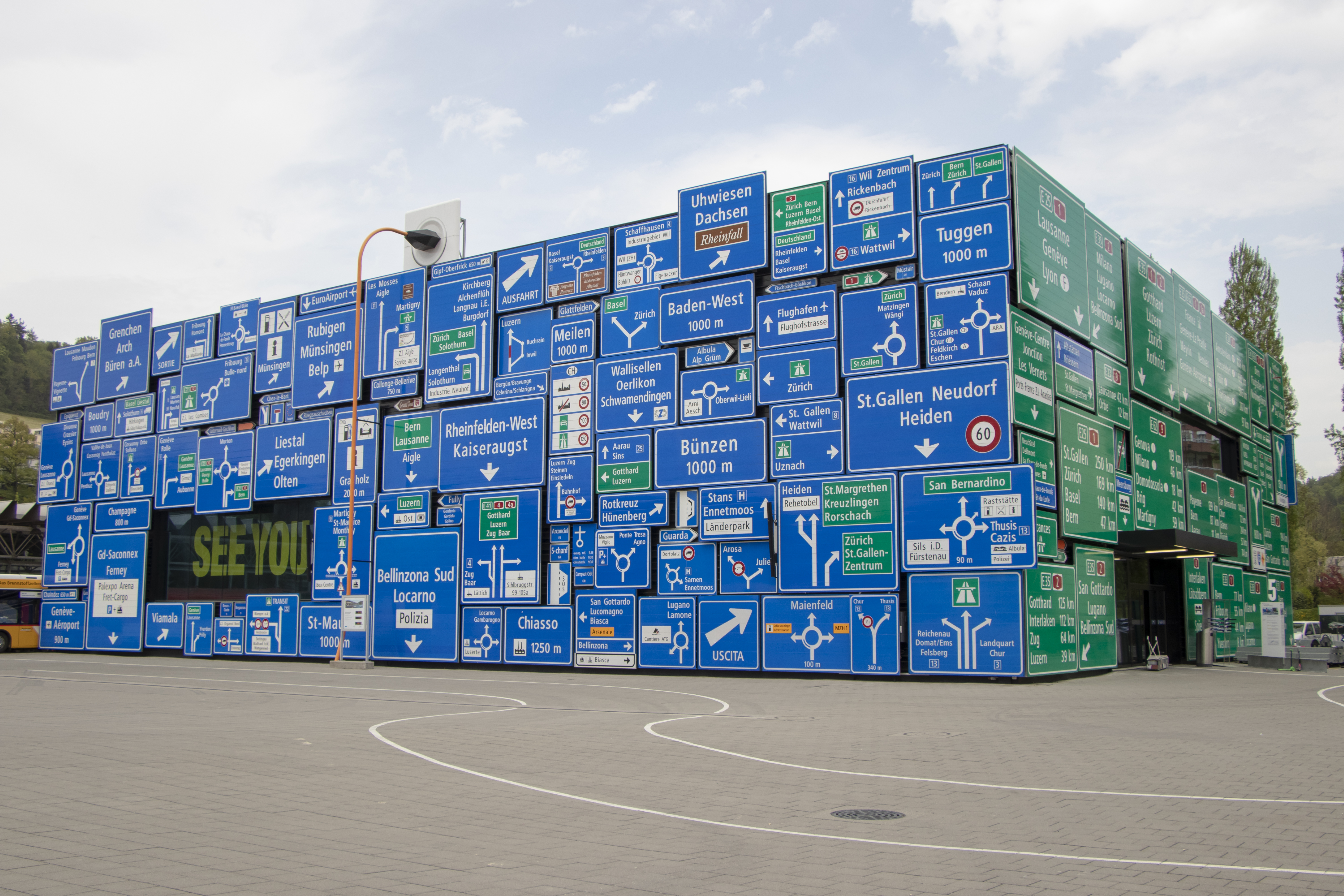 Die Halle Strassenverkehr im Verkehrshaus zieren zahlreiche Signaltafeln aus dem Schweizer Strassenverkehr.